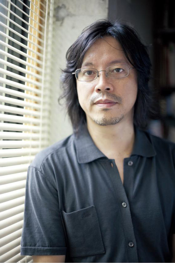 Foto del mangaka Naoki Urasawa.